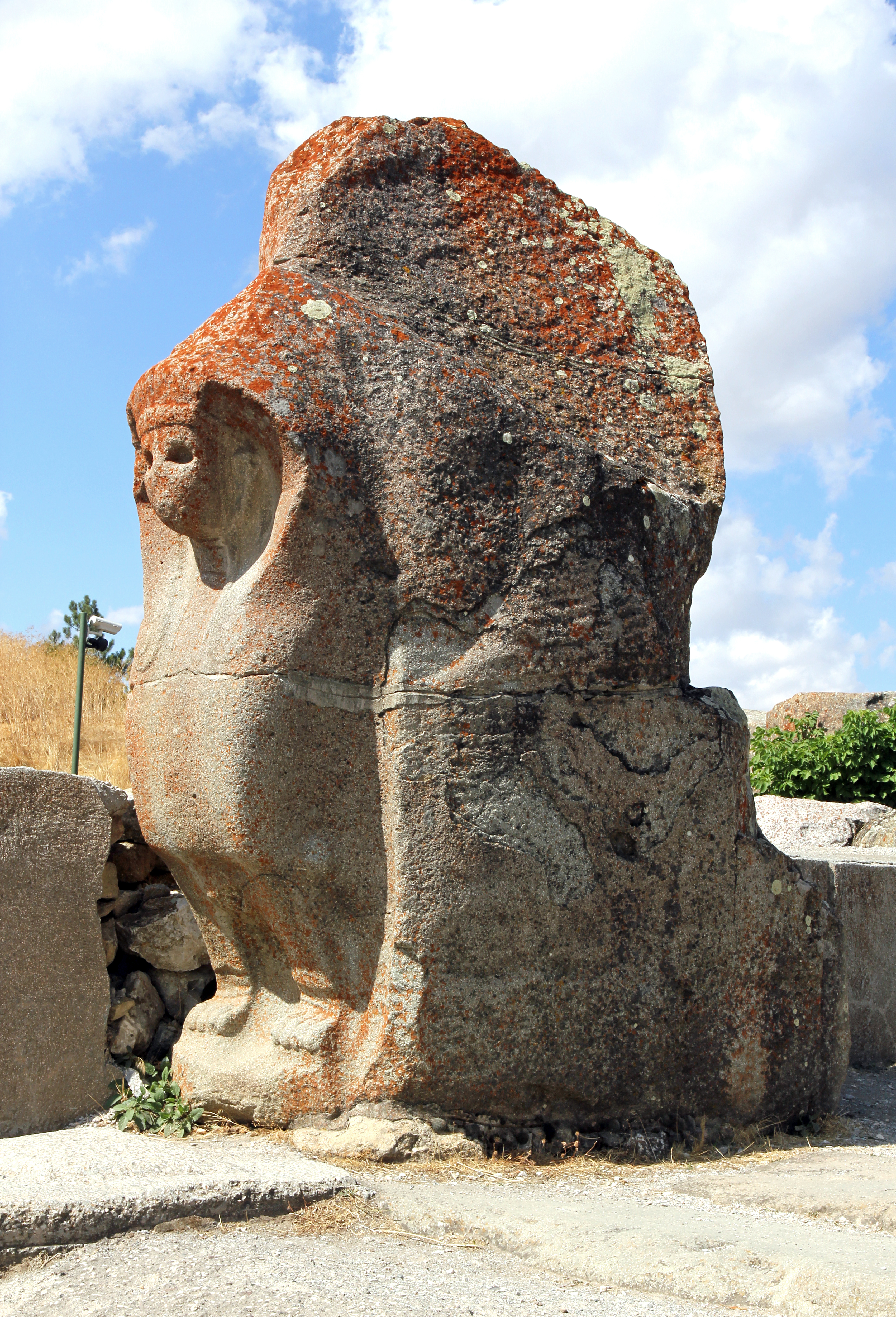 Alaca Höyük, Siedlungshügel in Zentralanatolien, Sphinxtor linke Seite - Die Sphingen sind Repliken, die Originale stehen im Museum für anatolische Zivilisationen in Ankara